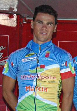 Eloy Teruel. Contentpolis-Murcia, Euskal Bizikleta 2008